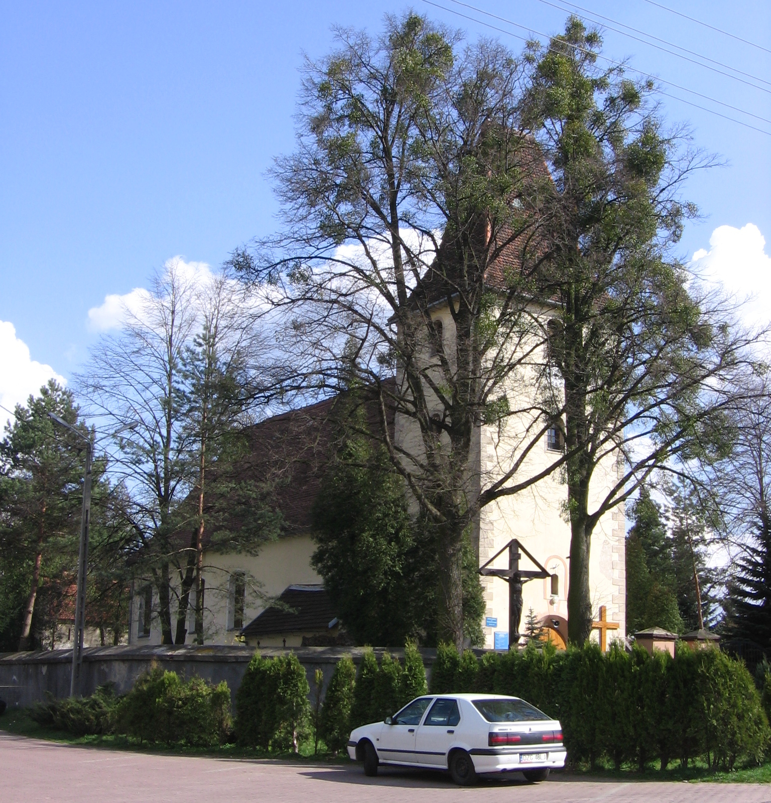 Mrozów, ul. Wyzwolenia 17 - kościół parafialny p.w. MB Zwycięskiej, poł. XIV, XVI, 1686 (zabytek nr A/1158/301)